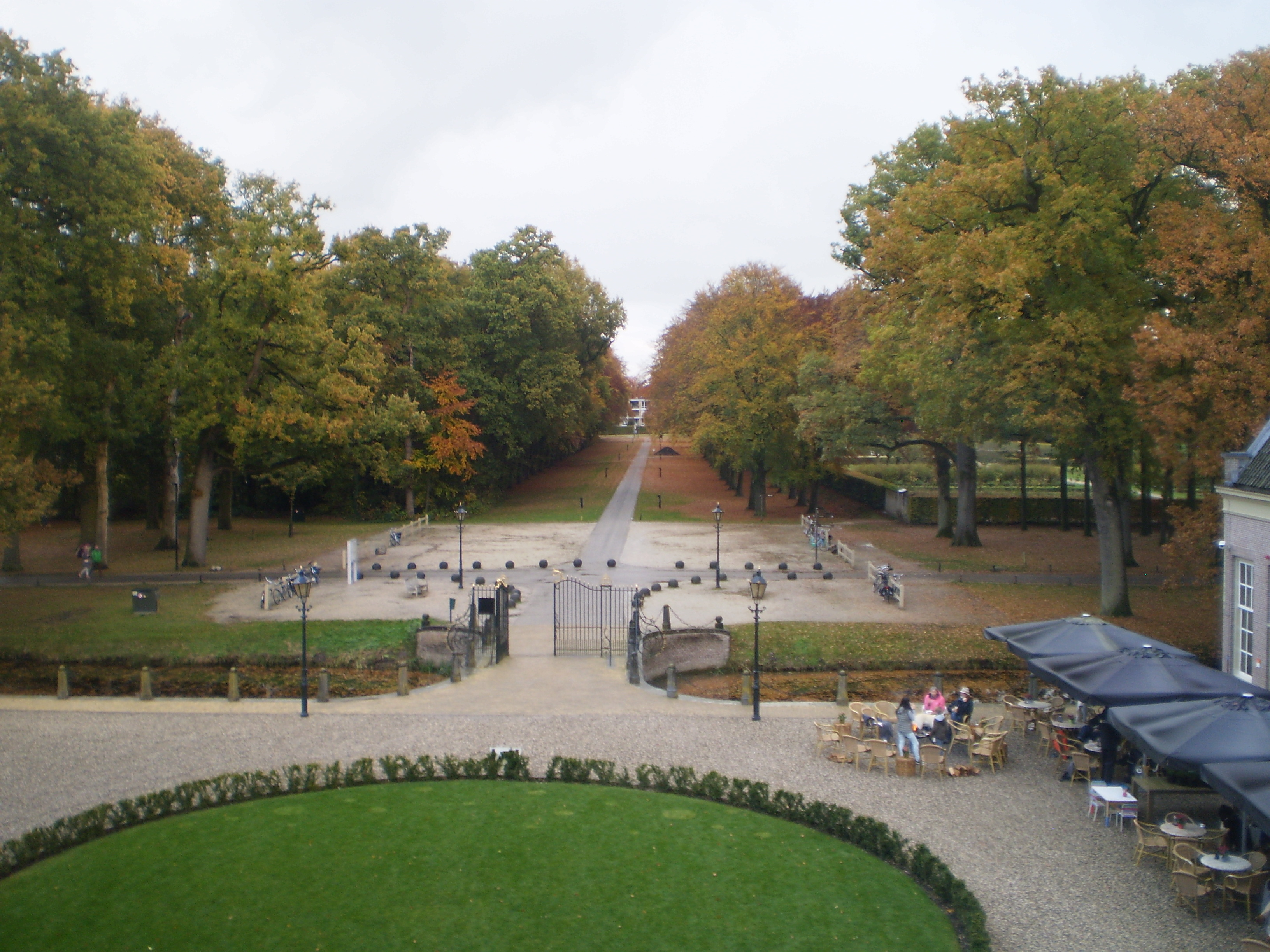 Vanuit Groeneveld richting Amsterdamsestraatweg. Rechts de ommuurde tuinen